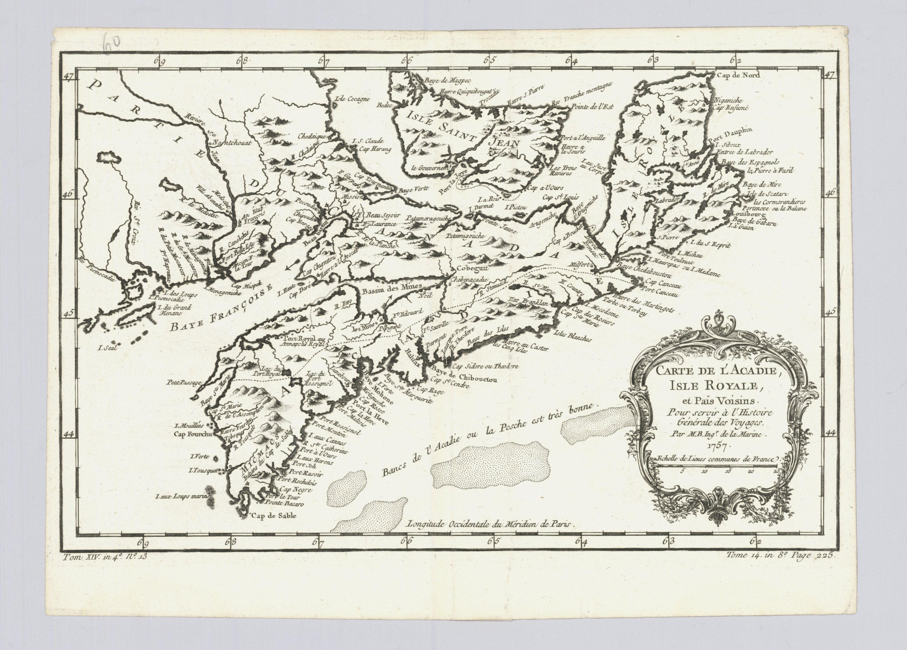 Carte de l'Acadie, Isle Royale, et païs voisins : pour servir à l'Histoire générale des voyages